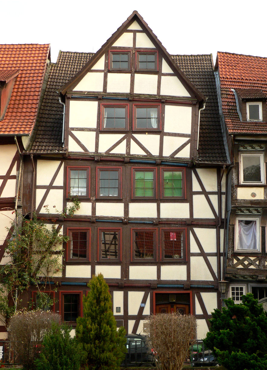 Hann Münden Hinter der Stadtmauer 23, jüdische Schule 1796-1938, ab 1834 Synagoge im Hof, 1974 Mikwe entdeckt